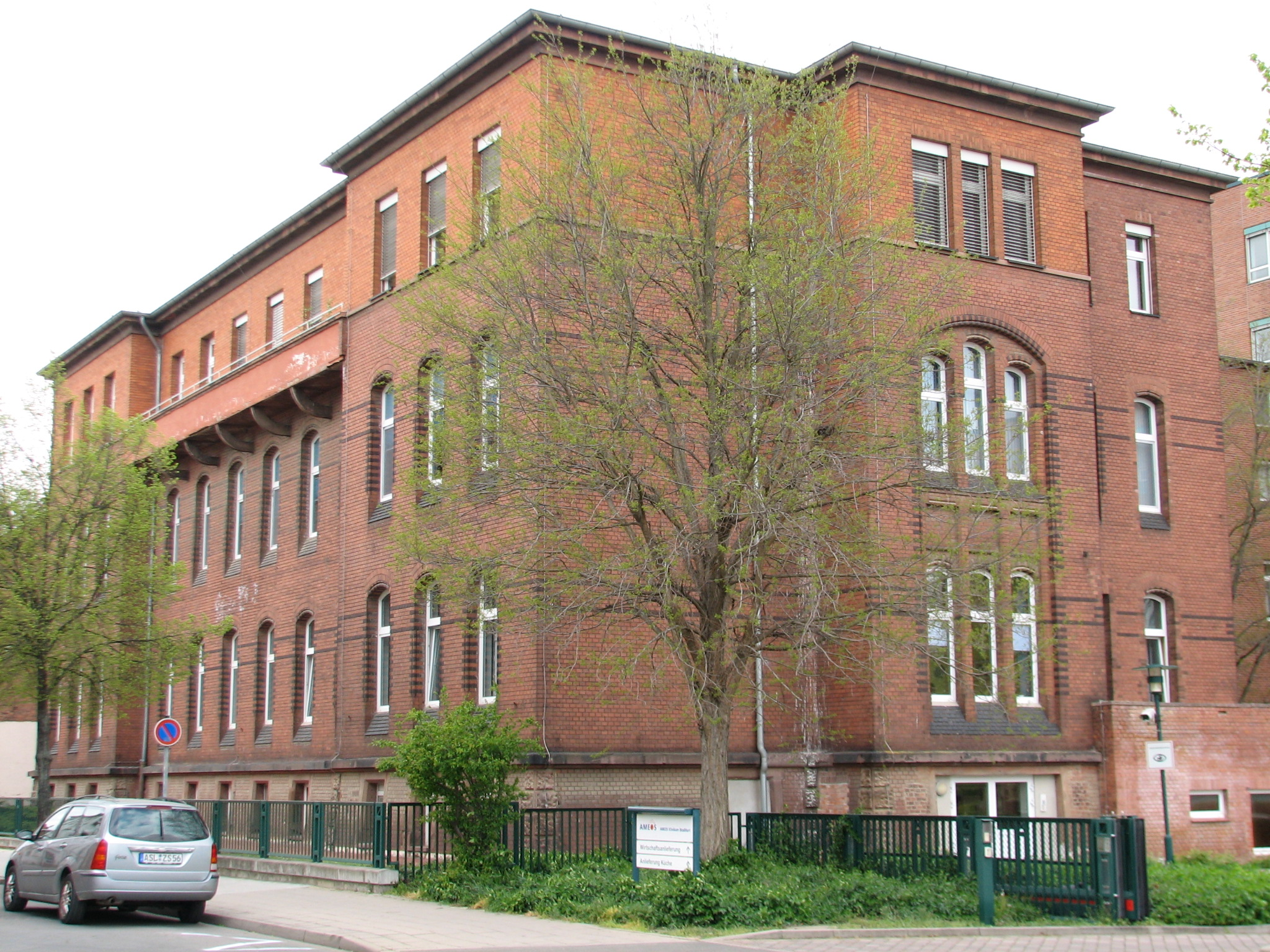 Erstes Zuhause des Deutschen Kalisyndikats in der Bodestraße in Leopoldshall; Umbau in den 1930er Jahren, seitdem Nutzung als Krankenhaus (anfangs Knappschafts-Krankenhaus). Foto vom April 2019.